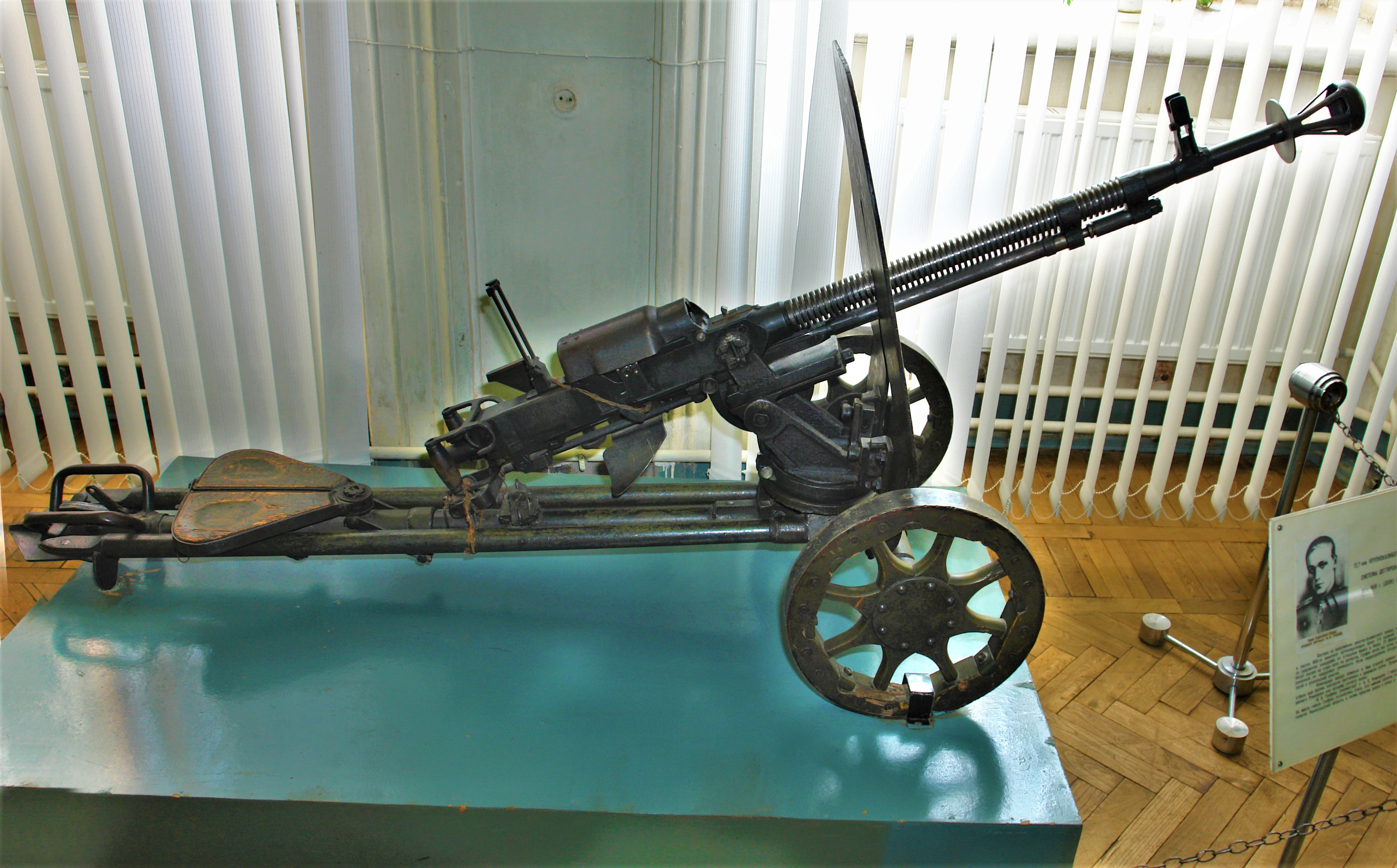 12,7-мм КРУПНОКАЛИБЕРНЫЙ ПУЛЕМЕТ СИСТЕМЫ ДЕГТЯРЕВА-ШПАГИНА обр. 1938 г. (ДШК) № ДО 1075 Военно-исторический музей артиллерии, инженерных войск и войск связи, Санкт-Петербург.